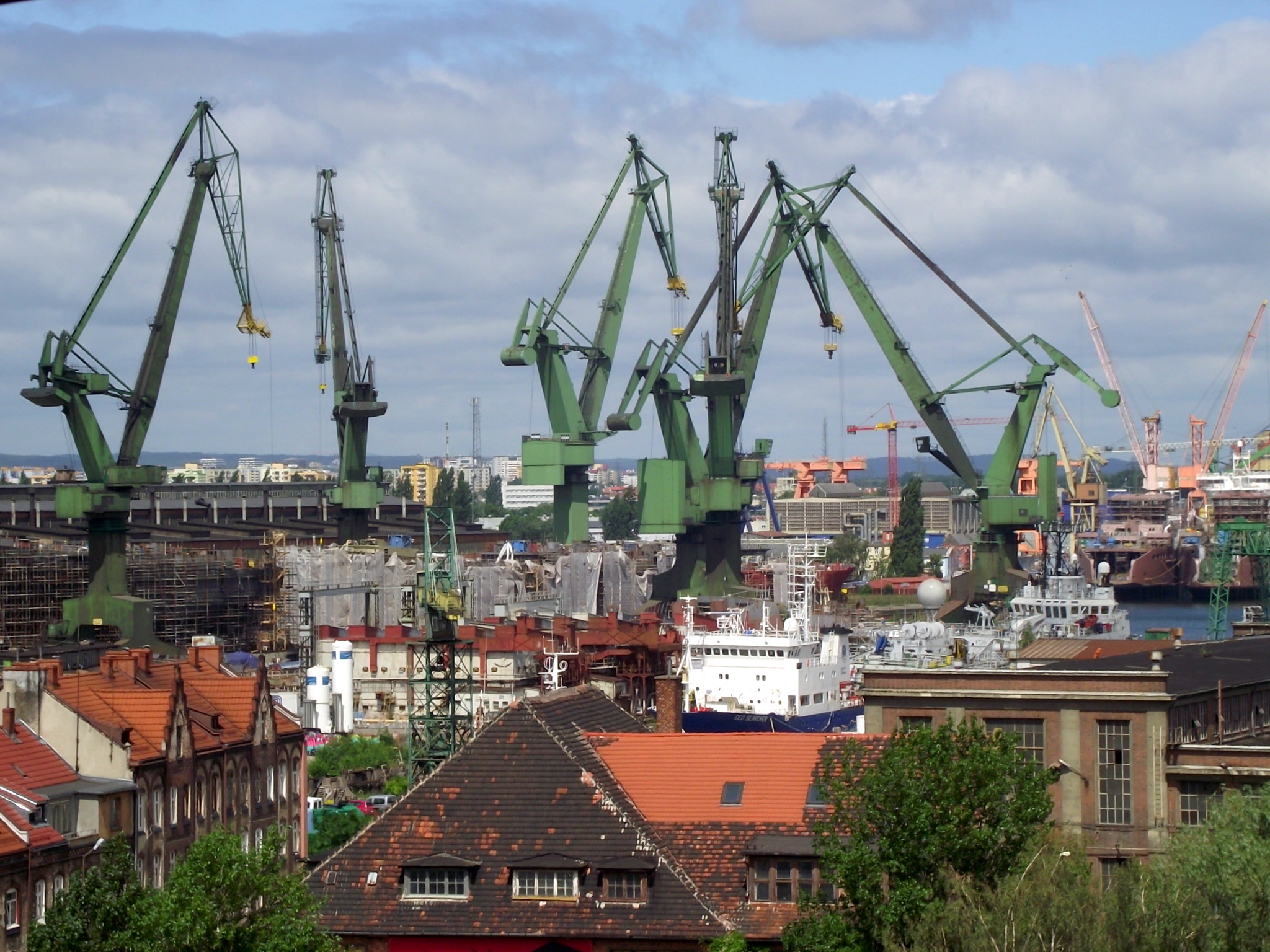 Gdańsk-Stocznia